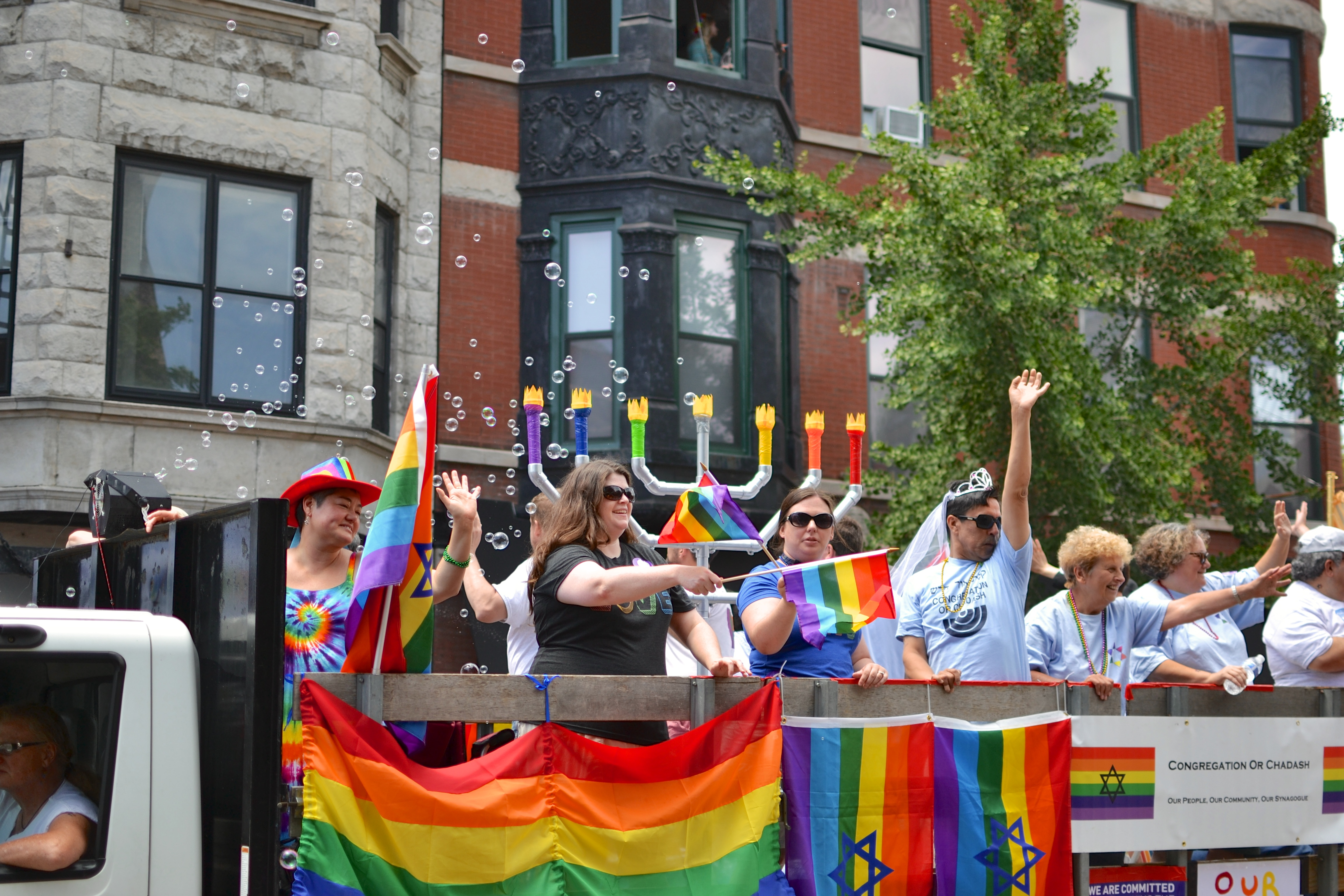 Menorah